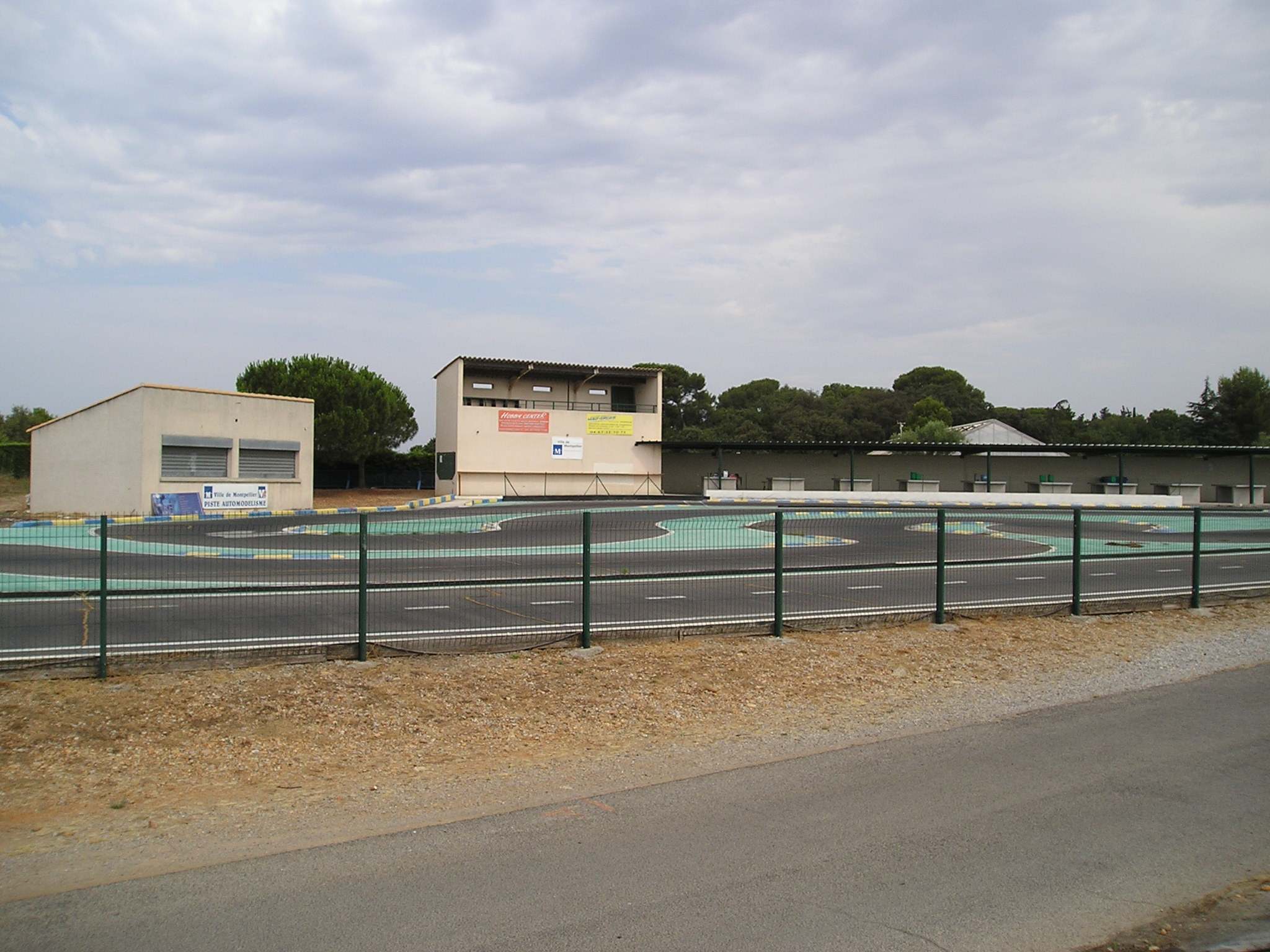 Le circuit d'automodélisme du domaine de Grammont, à l'est de Montpellier.